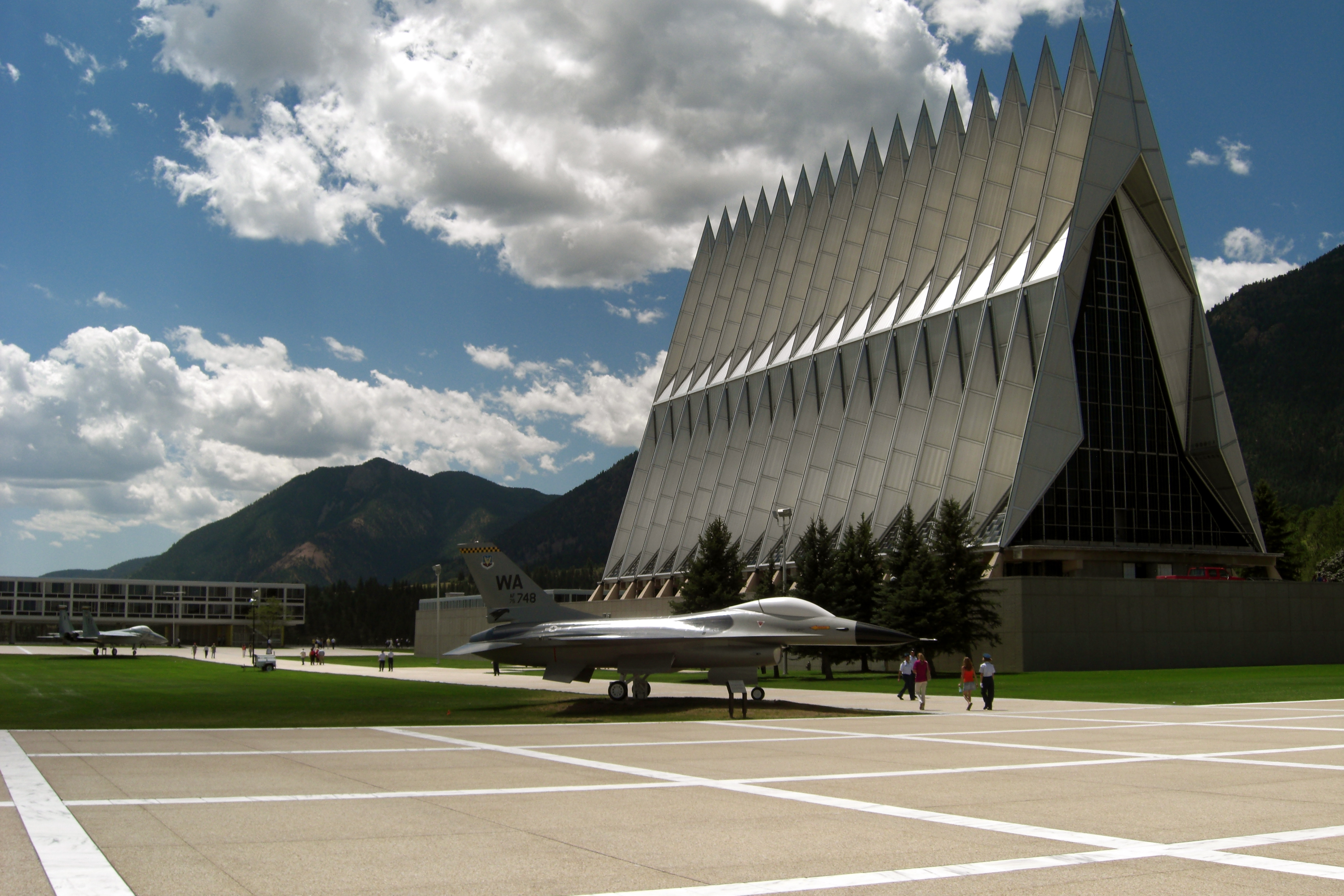 Air academy chapel